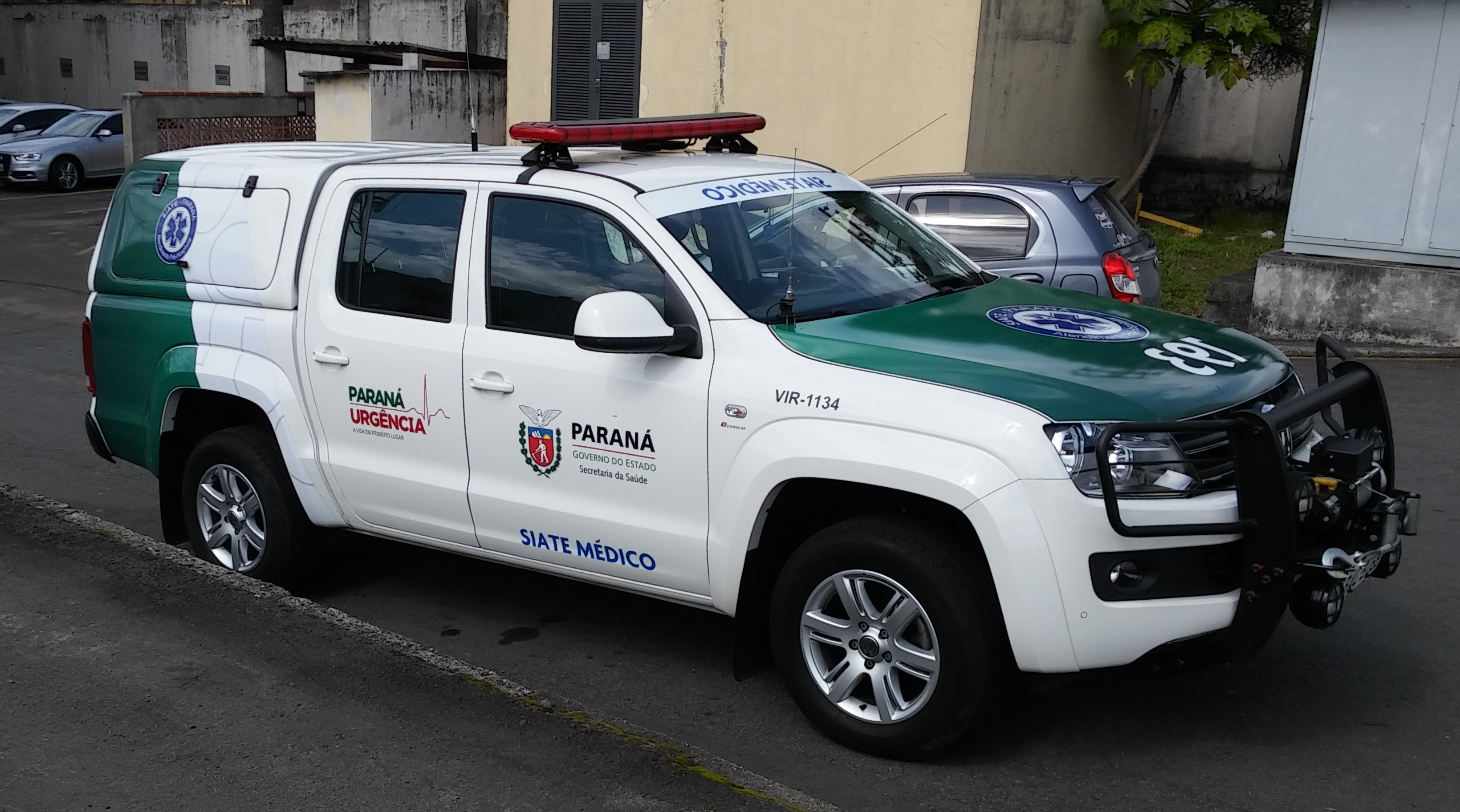 Viatura do Serviço Integrado de Atendimento ao Trauma em Emergência, Paraná.